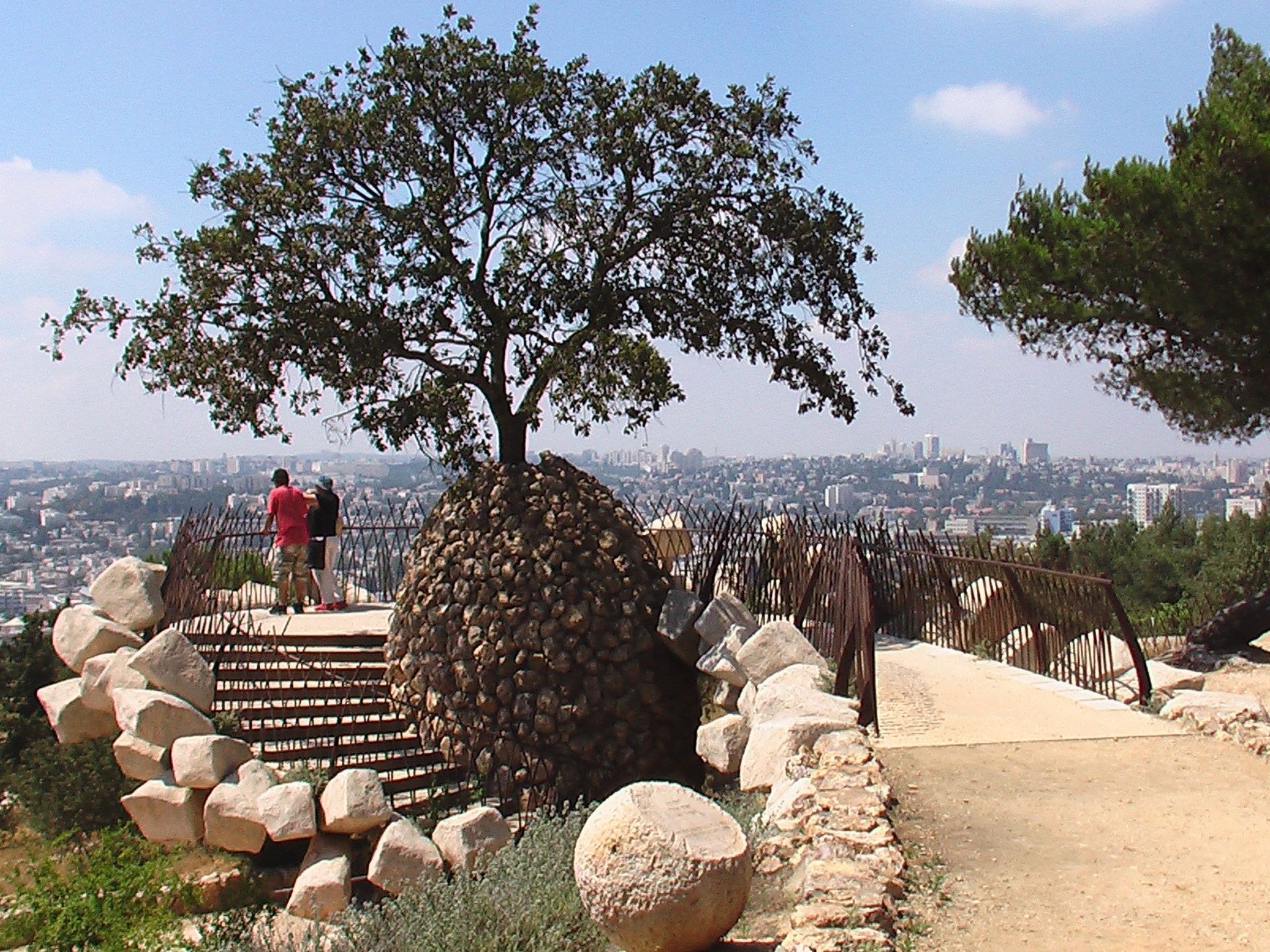 מצפה יאיר ליד רמת רחל. צילם י.ש. 18:27, 17 יולי 2006 (IDT)